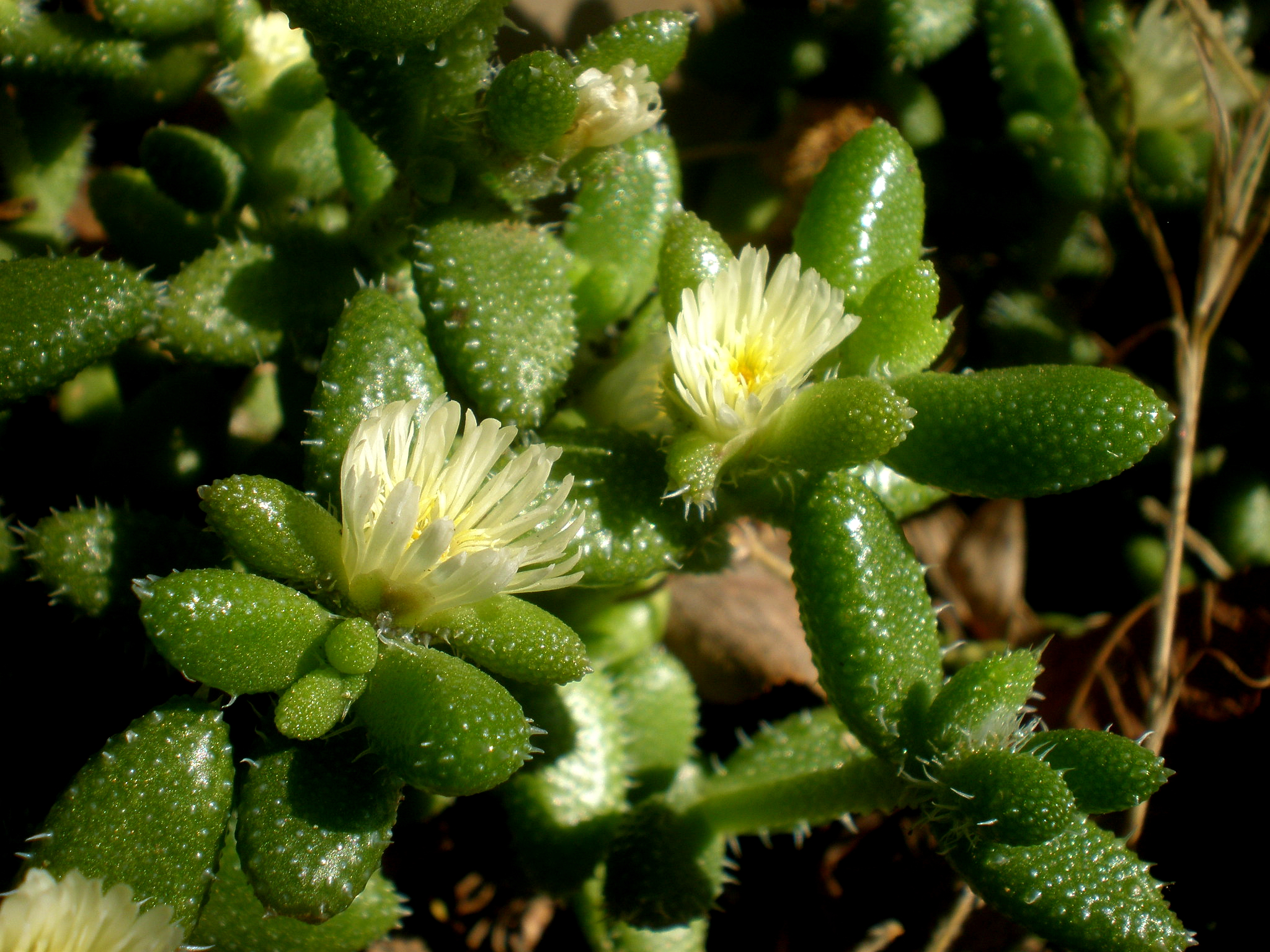 Jardín Botánico de Barcelona.